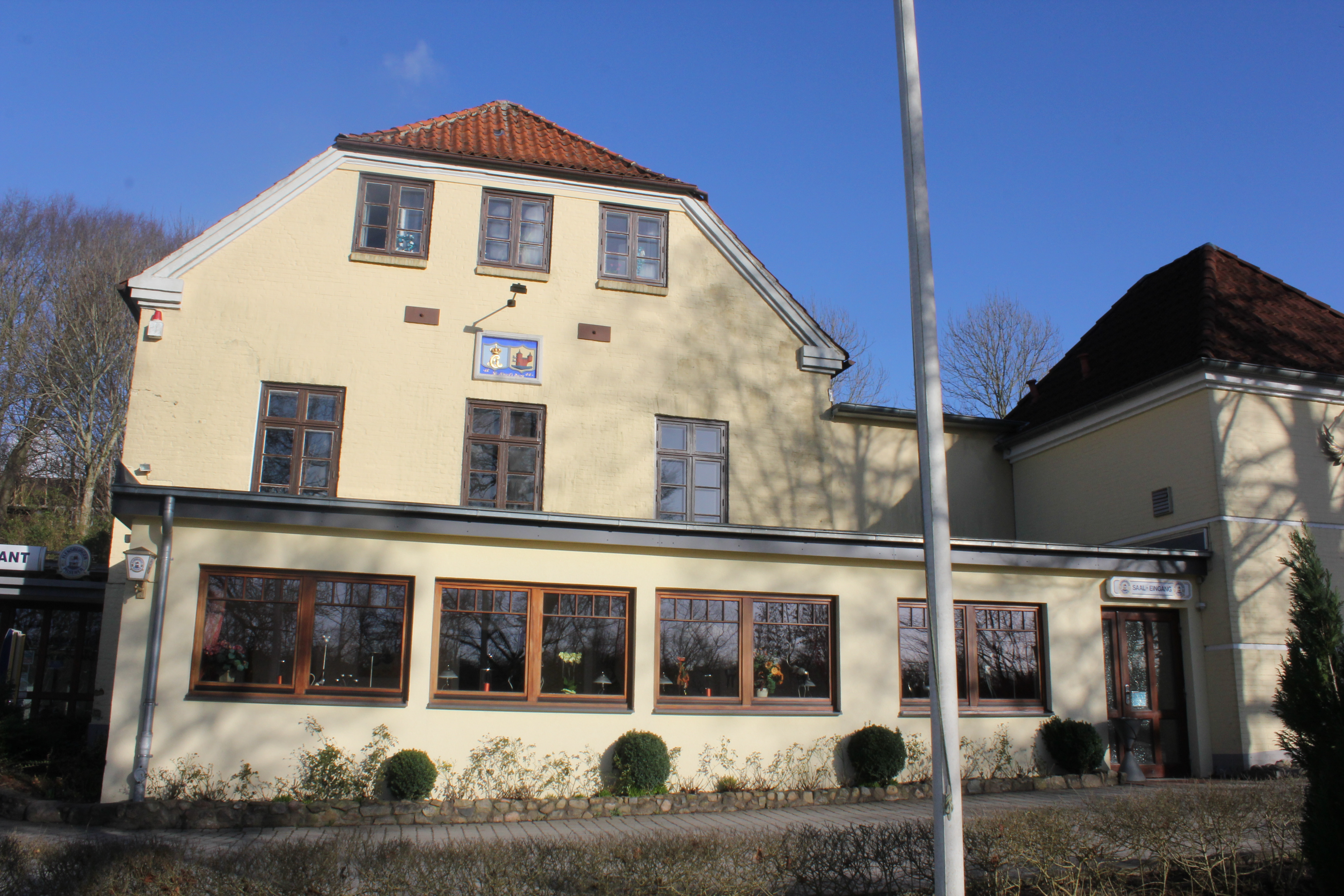 Restaurant_St._Knudsborg,_Flensburg,_Bild_03